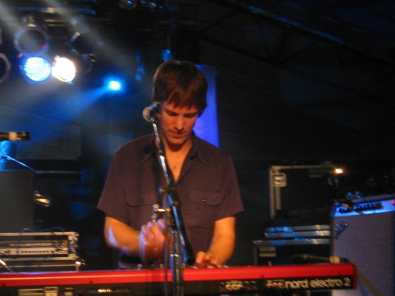 Okkervil River keyboardist at a festival in 2006.